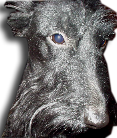 Esta es una imagen obtenida por mi y luego tratada igualmente por un servidor con un programa de retoque fotográfico.